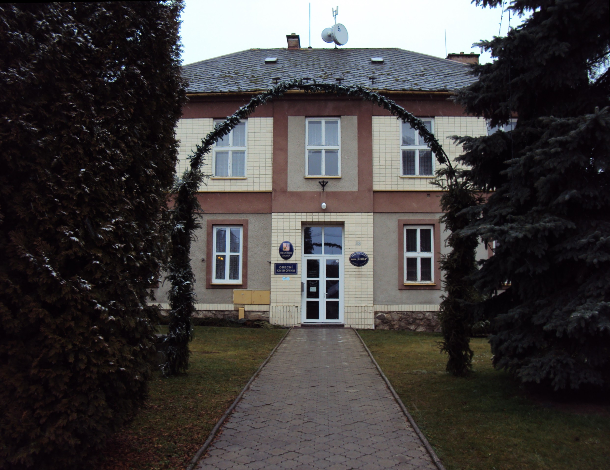 Zborov knihovna02